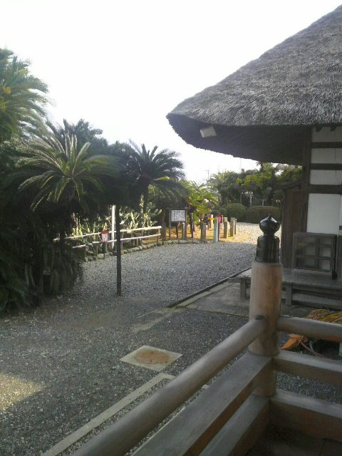 龍華寺 茅葺の本堂と大蘇鉄